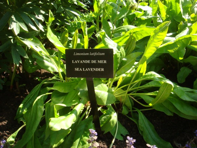 Lavande de mer, photo prise aux jardin de Métis, Grand-Métis, Québec, Canada. Été 2009.